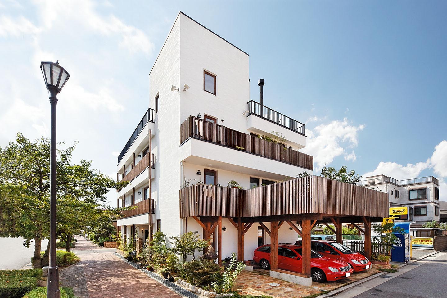 株式会社Oh! オフィス外観